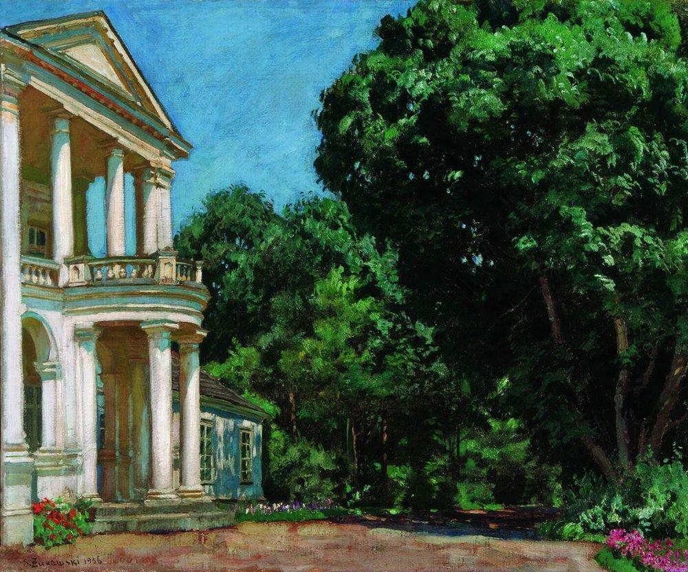 Беларуская (тарашкевіца): Падароск (Padarosk), сядзіба Чачотаў (Čačot). Карціна «Сядзіба ўлетку»